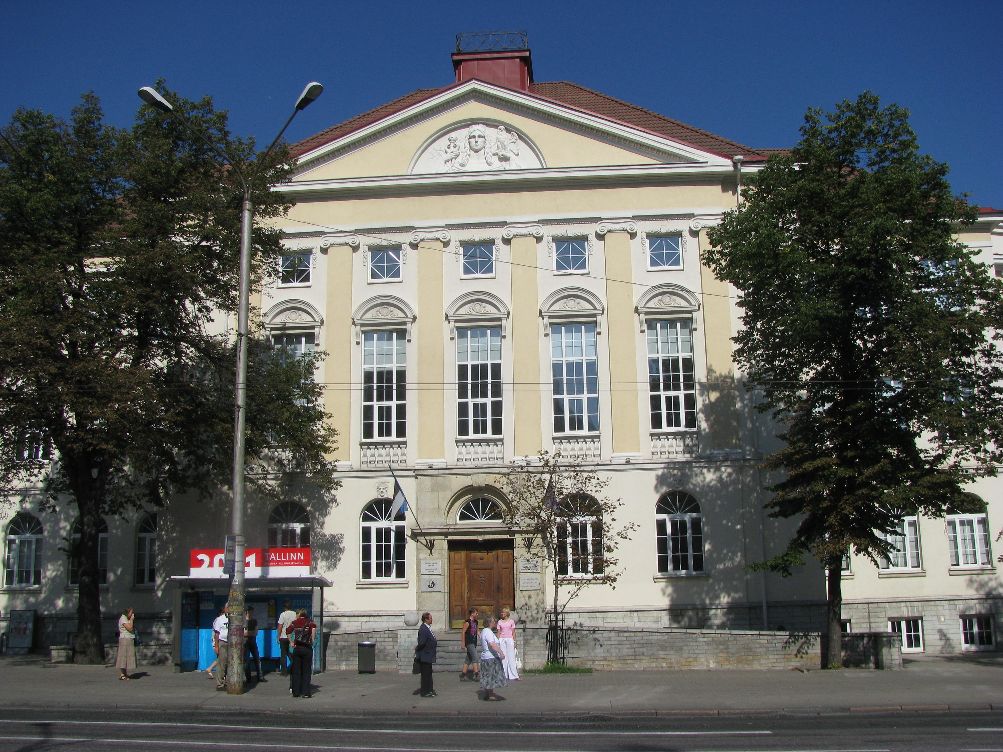 Tallinna Inglise Kolledži hoone fassaad Estonia puiesteel, arhitektid: Erich Jacoby ja Aleksander Rosenberg (†1935)